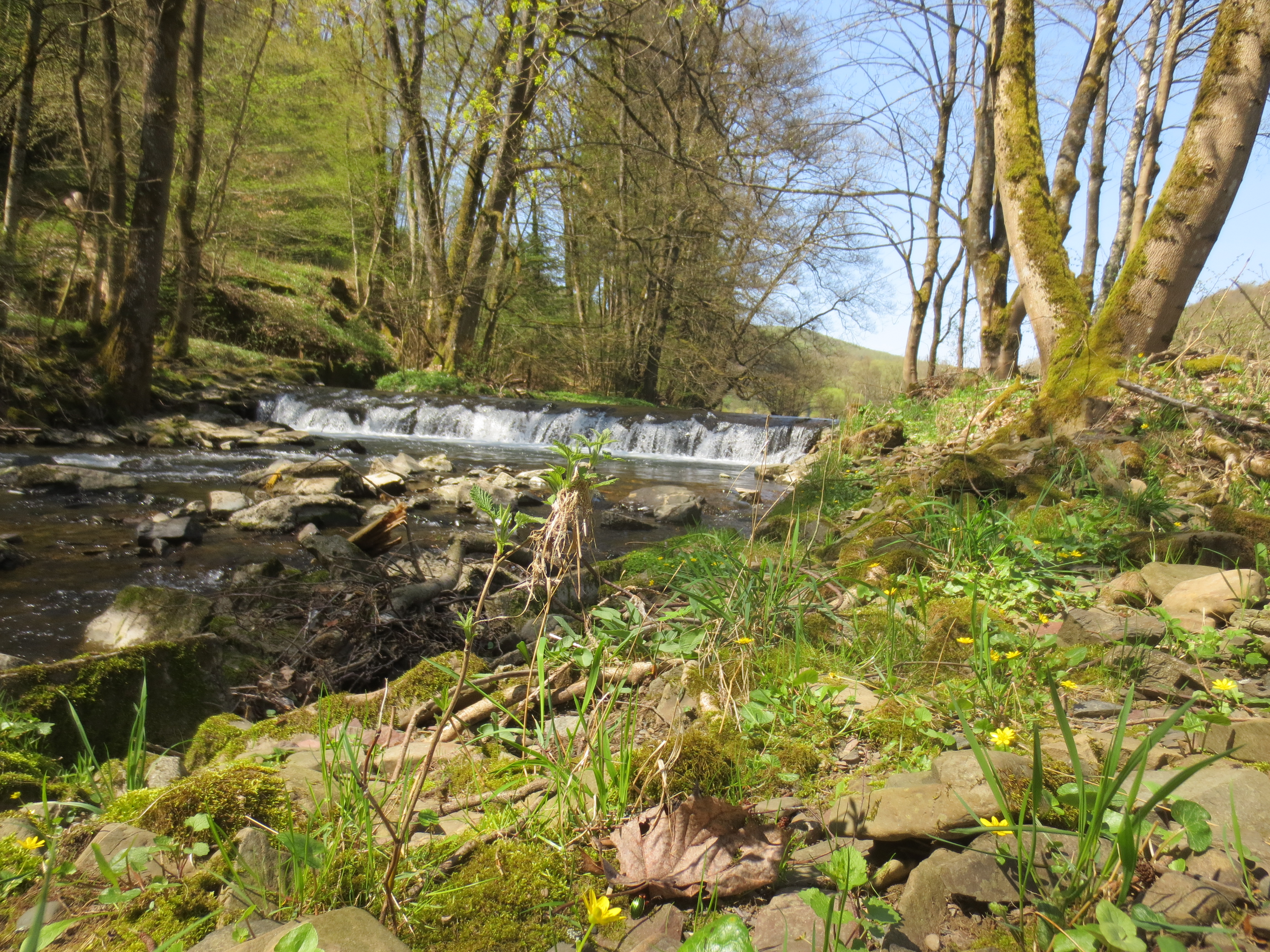 Verfallenes Lahnwehr in Kunst-Wittgenstein